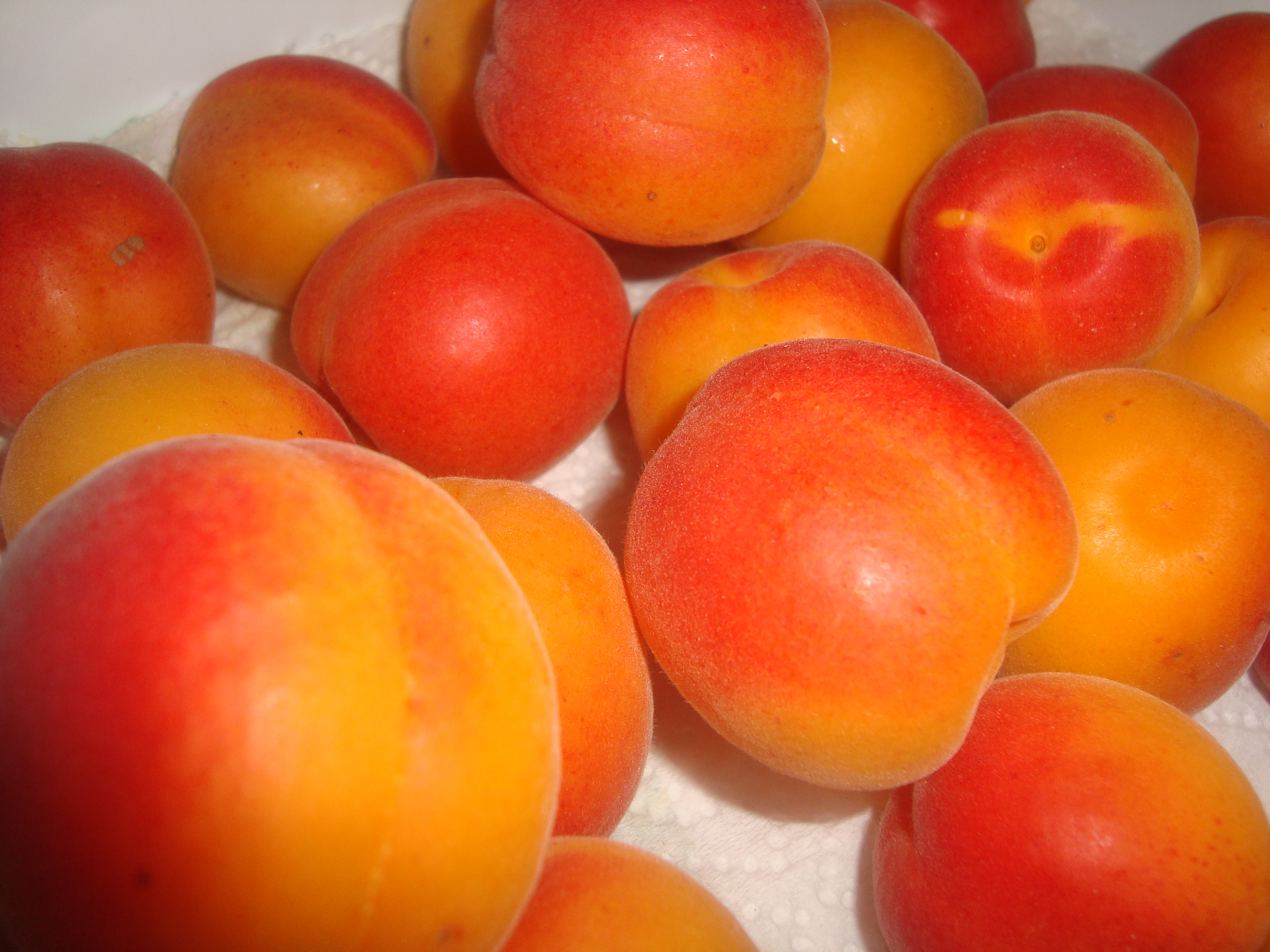 Albercocs de la Galta Roixa, aquesta varietat d'albercocs és la més coneguda i consumida a la península ibèrica.